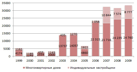 Динамика ввода жилой недвижимости на территории МО "Котлас" Источник данных: 1999-2004 годы: (страница 6), 2002-2008 годы: (страница 6) 2006-2009 годы: (страница 39)